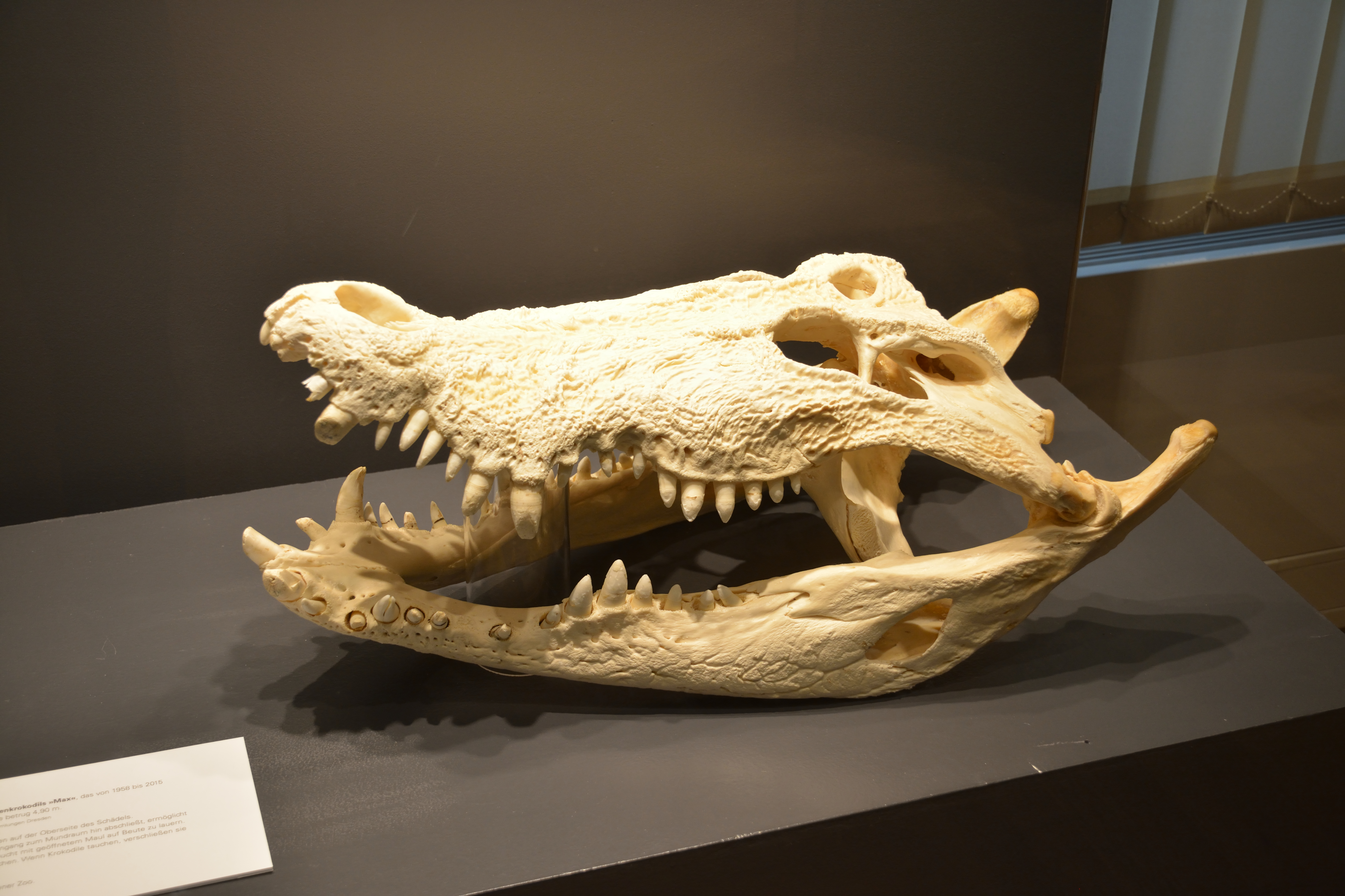 Impressionen einer GLAM on Tour (2018) im Senckenberg Museum für NaturkundeHier: Aufnahmen aus den Ausstellungsräumen